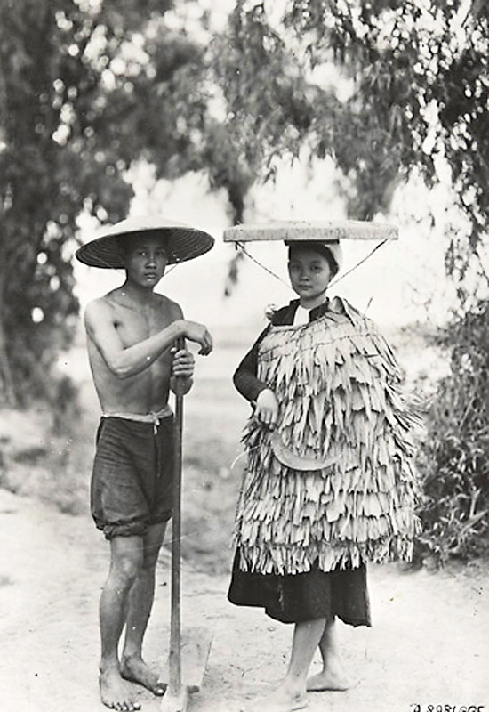 Paysans des environs de Hanoï. Femme vêtue de son manteau de pluie. 1921.